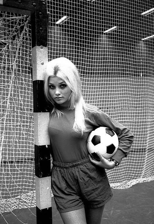 Pappan jobbade på varvet, mamman i tygaffär. Janet Ågren själv funderade på att bli frisörska, men vinsten i en stor skönhetstävling förändrade allt. Janet fick modelljobb och hann även med att posera för Anders Hilding i IK Atletens dress (senare Borstah